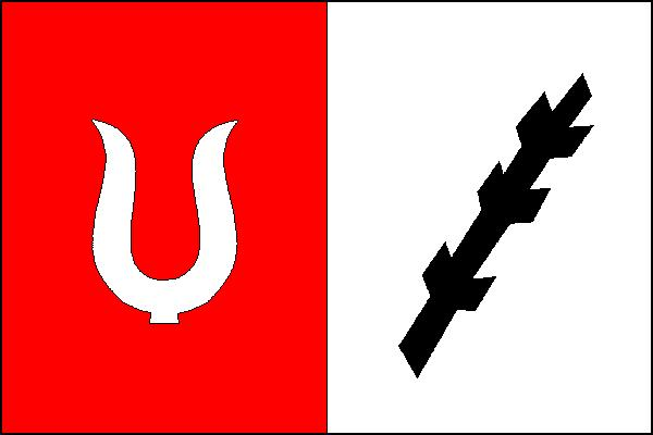 Vlajka obce Částkov (okres Tachov)